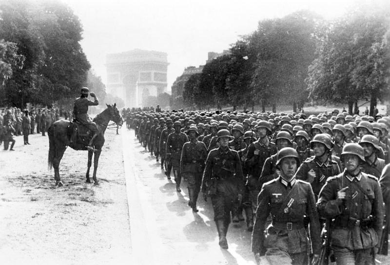 Paris, Avenue Foch, Siegesparade ADN-ZB/Archiv II. Weltkrieg 1939-45 Frankreich. Am 14. Juni 1940 nahmen Truppen der deutschen Wehrmacht Paris ein. Siegesparade der deutschen 30. Infanterie-Division auf der "Avenue de Foche" vor General Kurt von Briesen (1886–1941) (Aufnahme: Folkerts) 5317-40